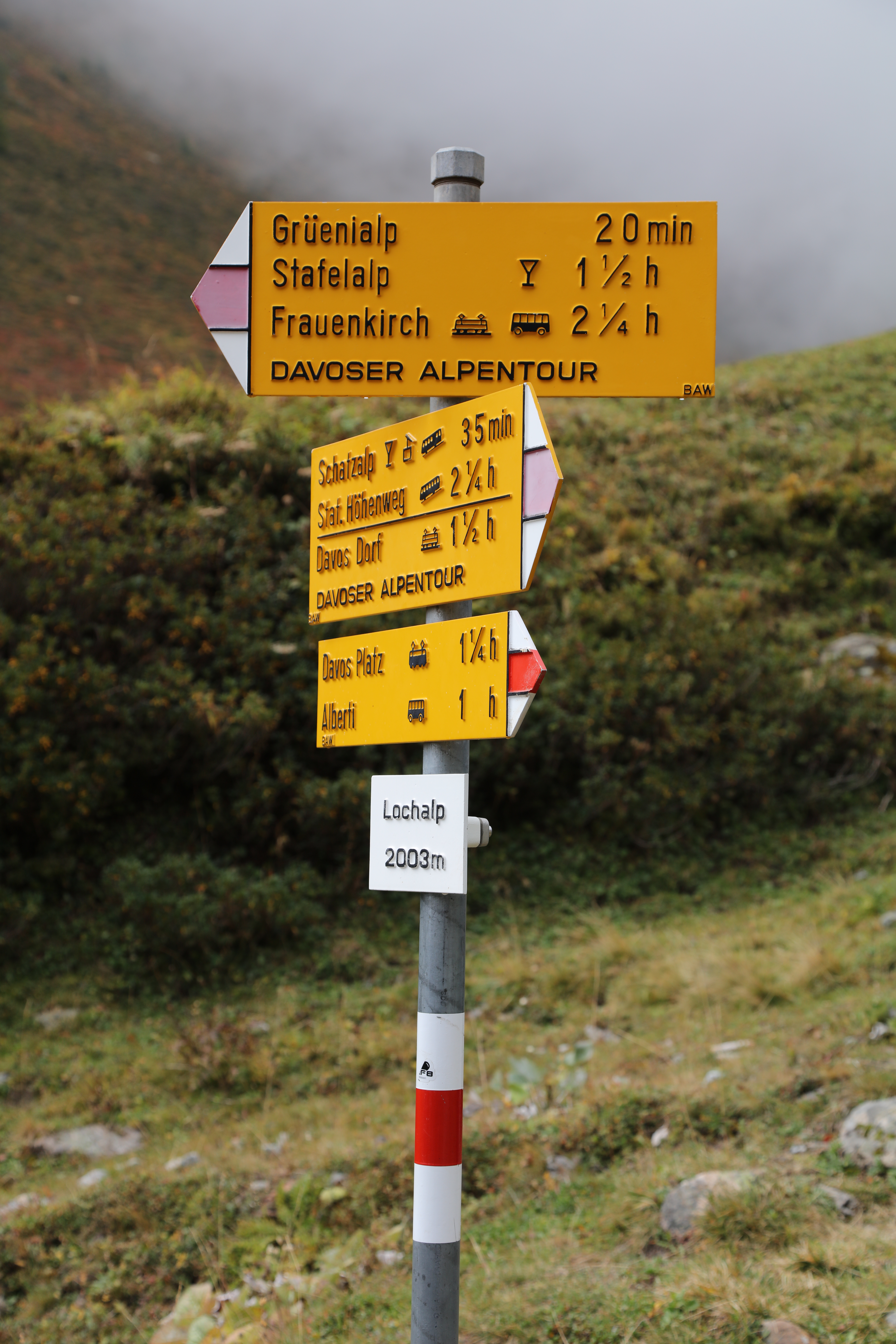 Die Lochalp oberhalb Davos Platz. Wanderweg Wegweiser